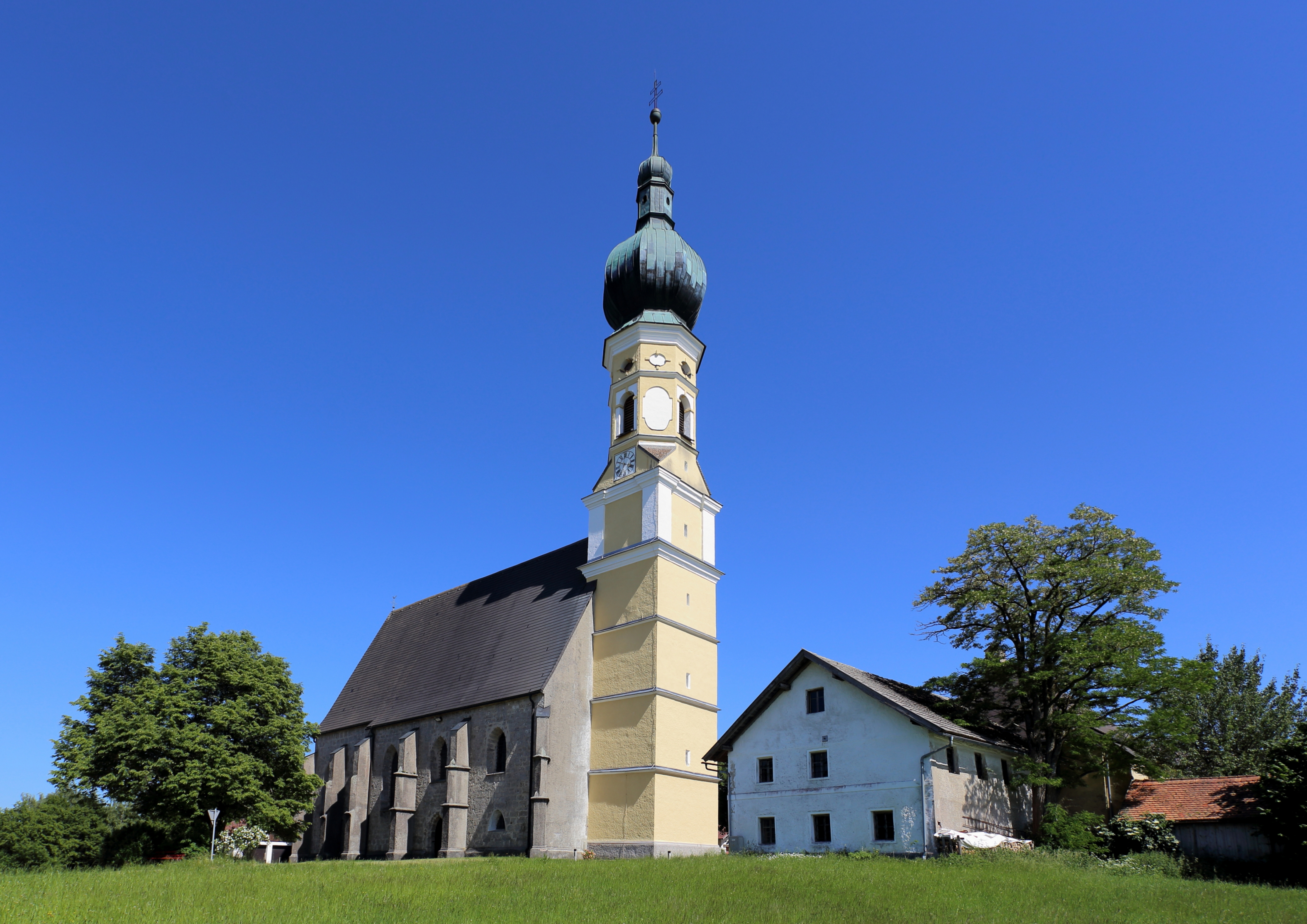 Filial- und Wallfahrtskirche zum allerheiligsten Altarsakrament in Hart, ein Ortsteil der oberösterreichischen Gemeinde Pischelsdorf am Engelbach. Eine gotische Kirche, die von 1510 bis 1519 errichtet wurde. 1640 erfolgte ein Sakristeianbau. Dem vorstellten Westturm wurde eine barocke Glockenstube mit Zwiebelhelm aufgesetzt.